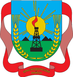 Герб Краснодонського району